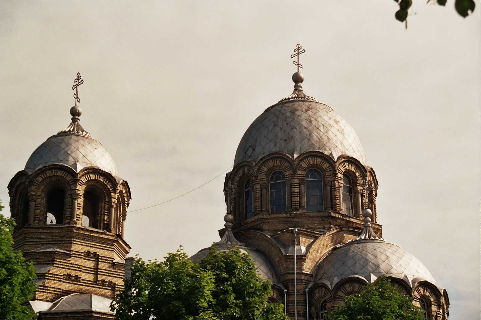 Ortodoksa preĝejo en Vilno.